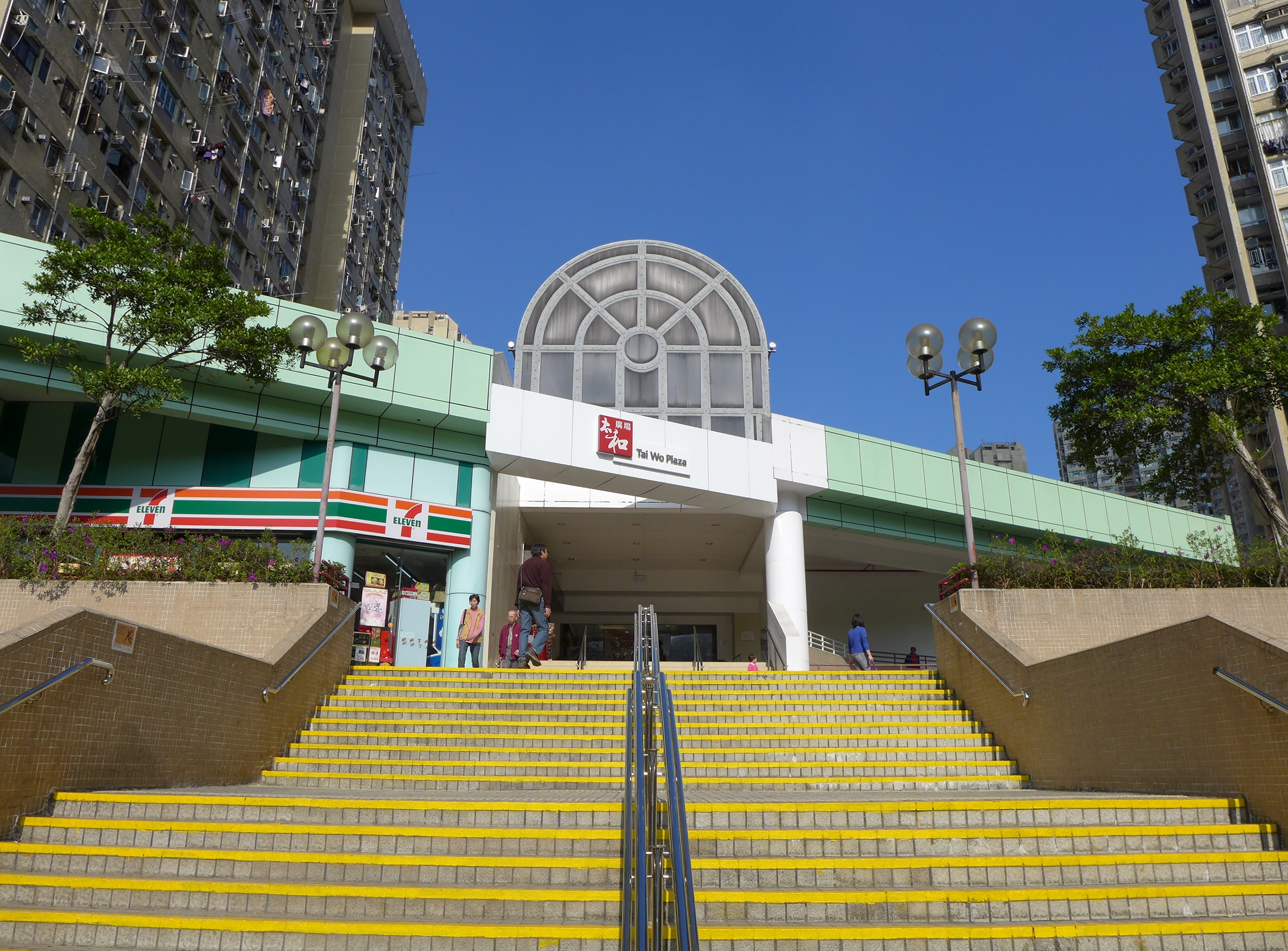 Tai Wo Plaza Outside view